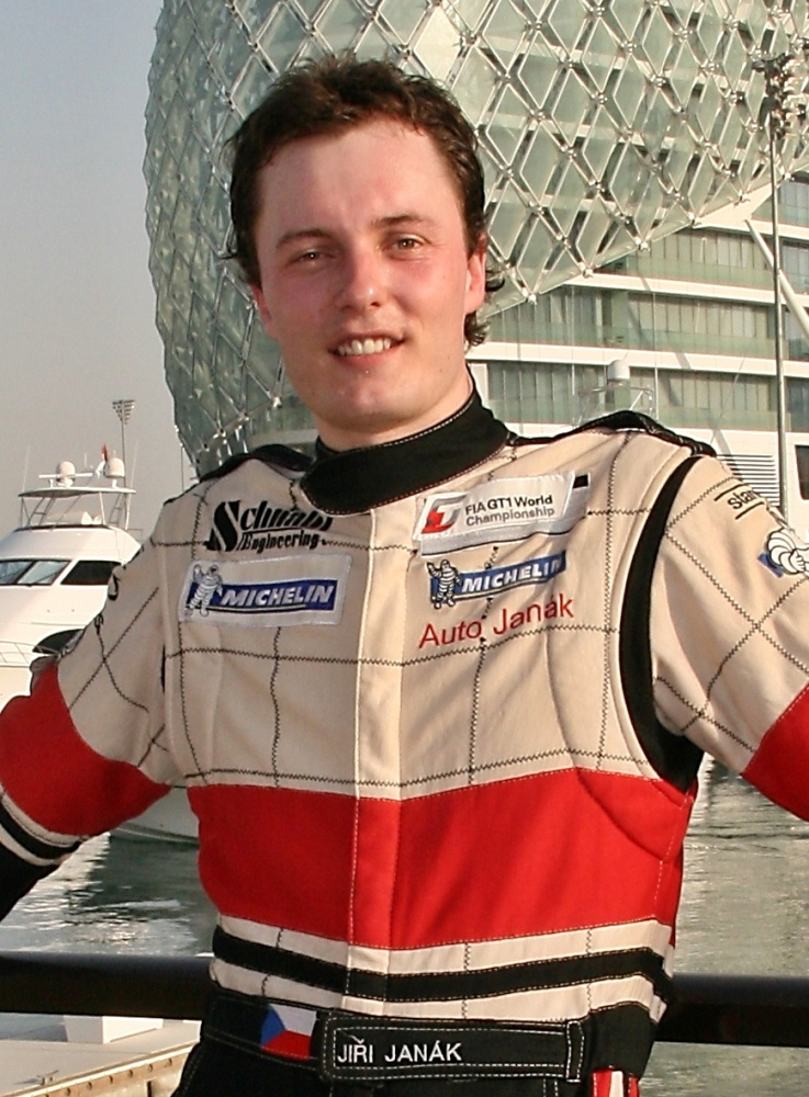 Jiří Janák - FIA GT1 2011, GP Abu Dhabi, Swiss Racing Team